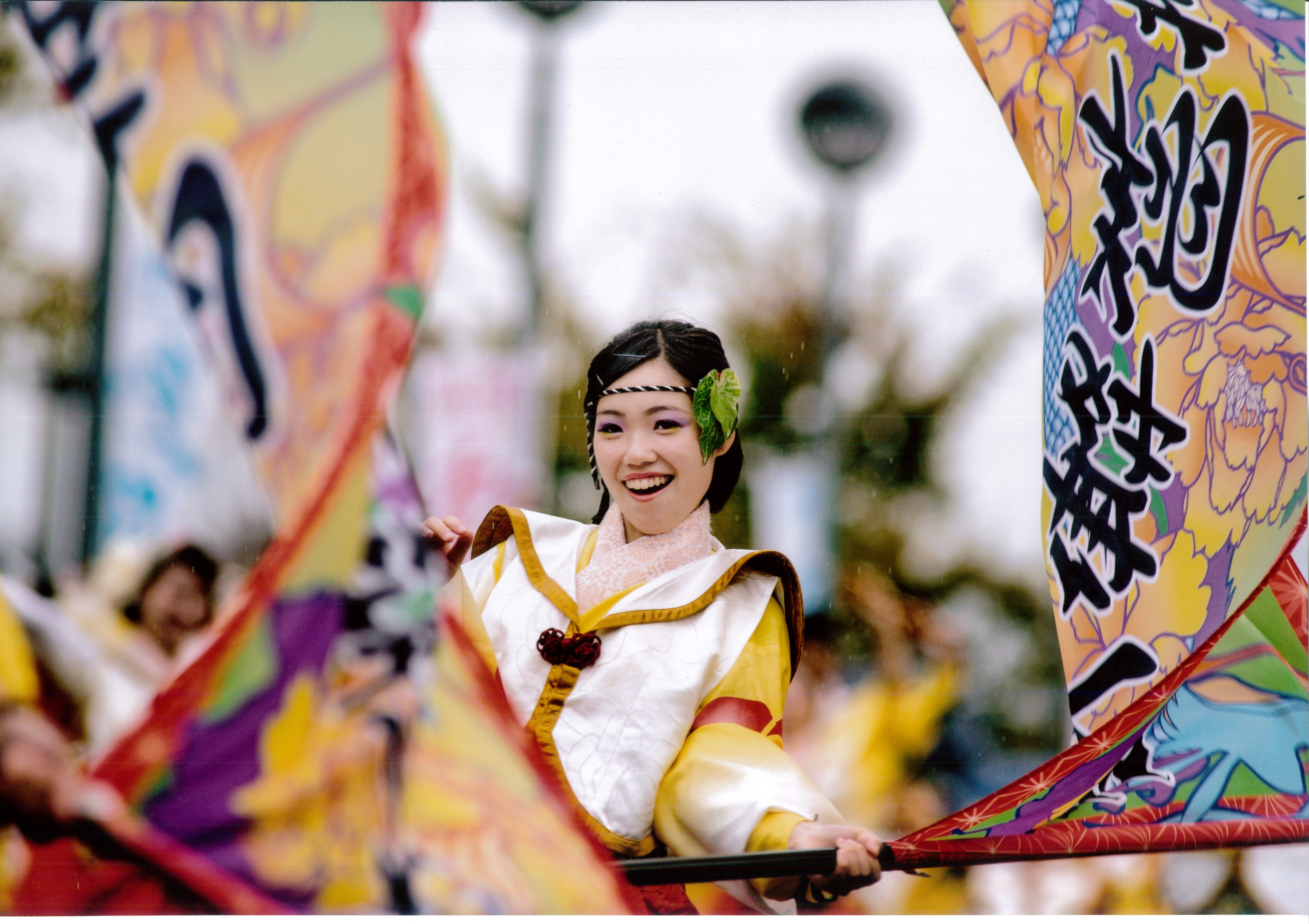 2017年に開催された第15回大会フォトコンテストの最優秀賞